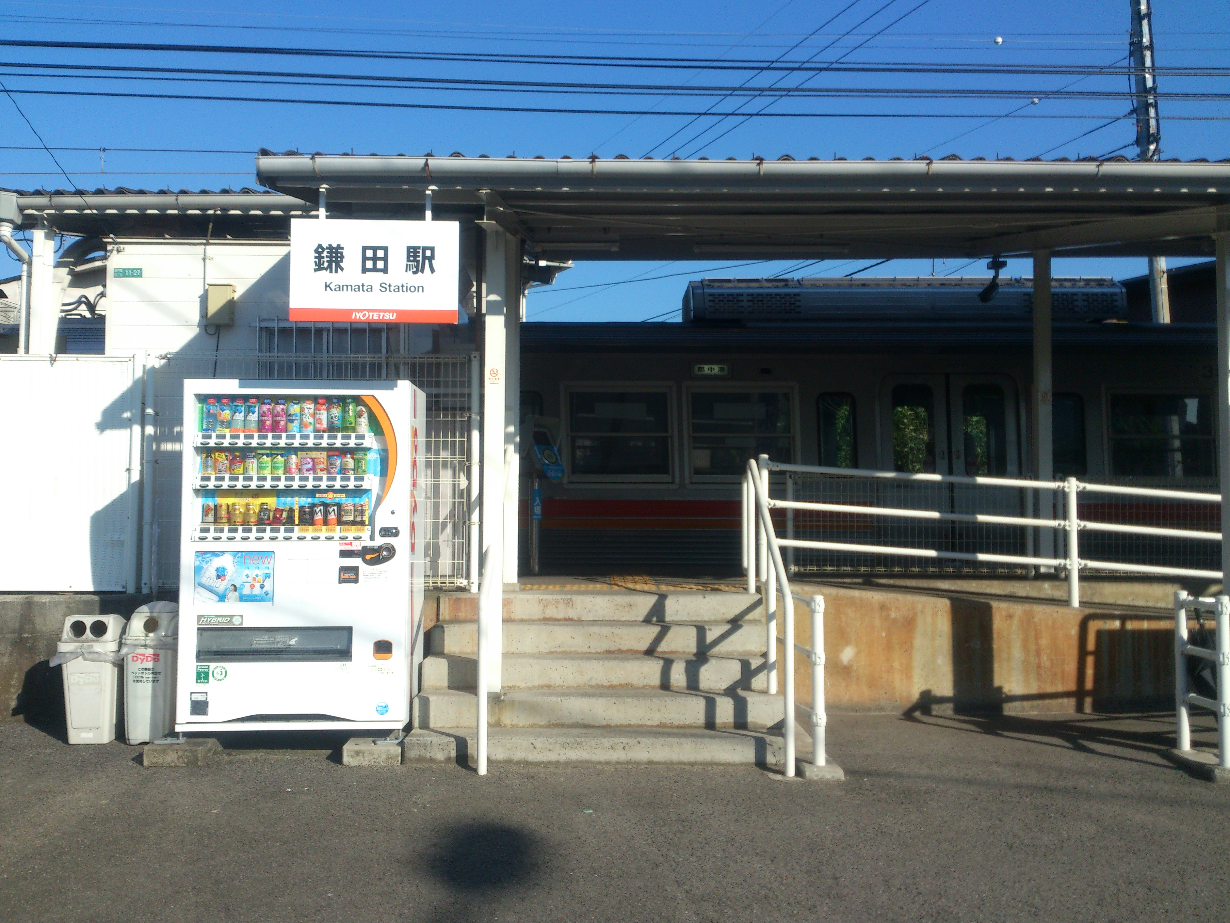 伊予鉄道 鎌田駅